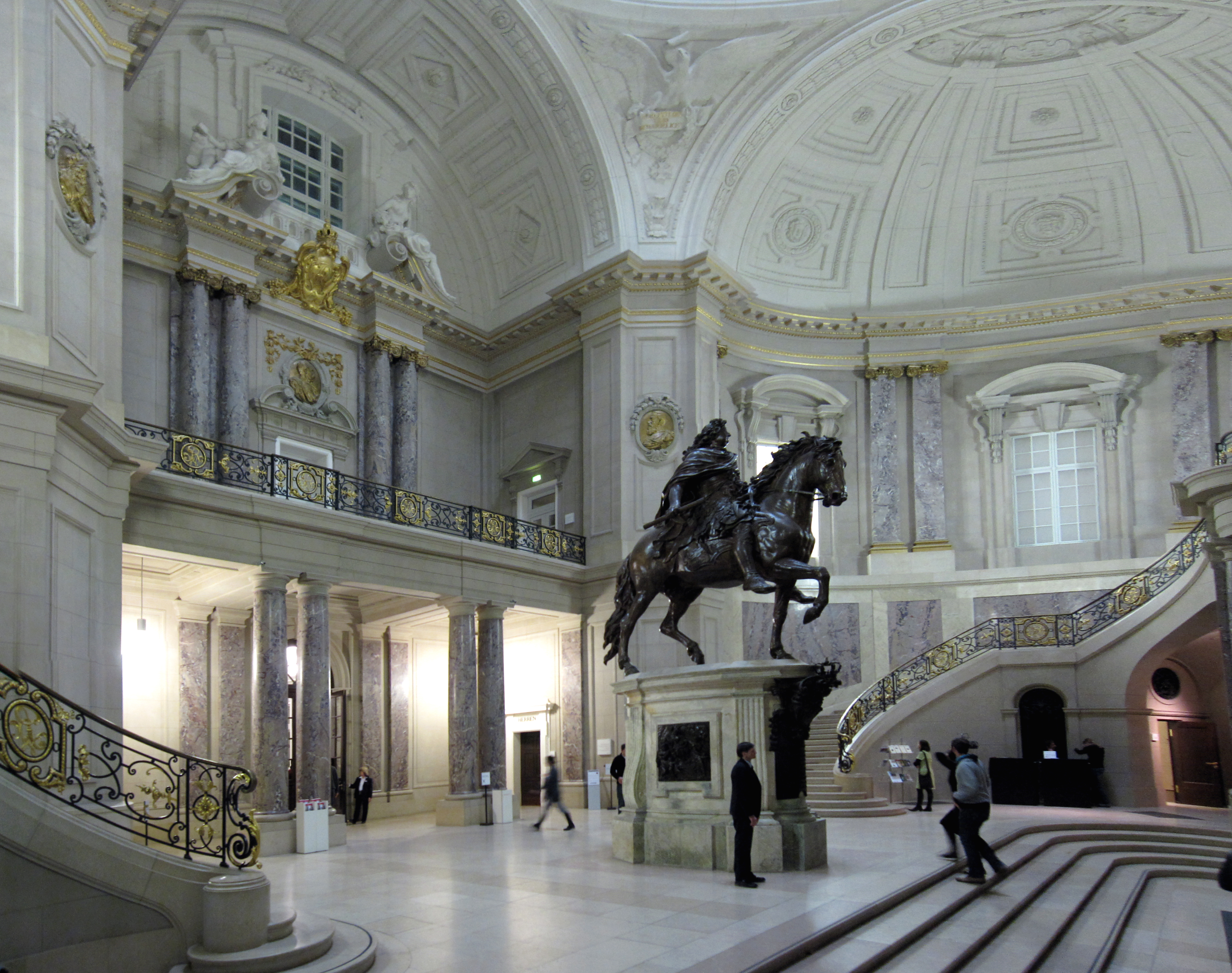 Bode-Museum, Halle mit Reiterstandbild des großen Kurfürsten von Andreas Schlüter(glavanoplastische Kopie, angefertigt 1904 von der WMF)